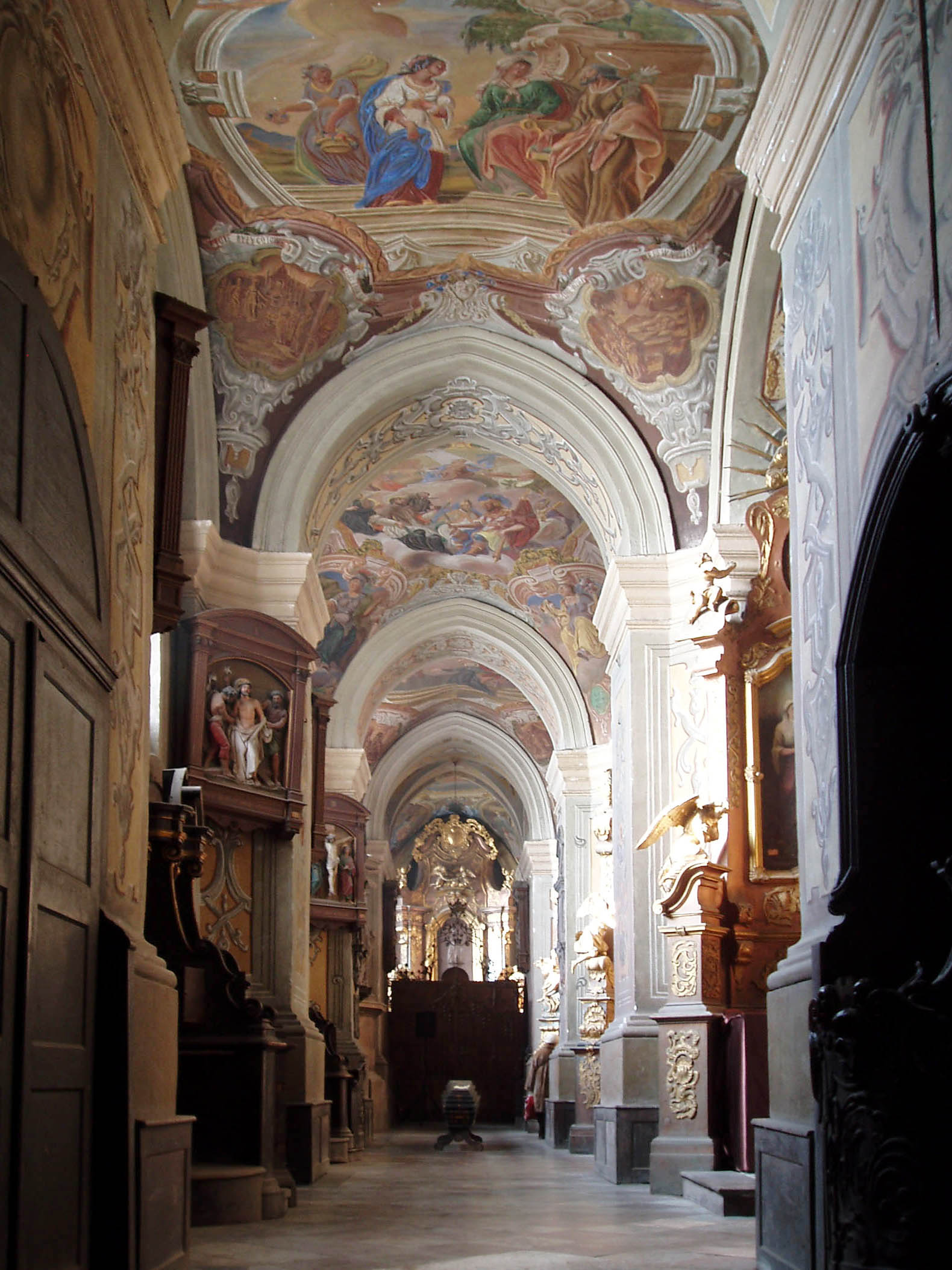 Ліва бічна нава колишнього костелу св. Петра і Павла оо. Єзуїтів у Львові.